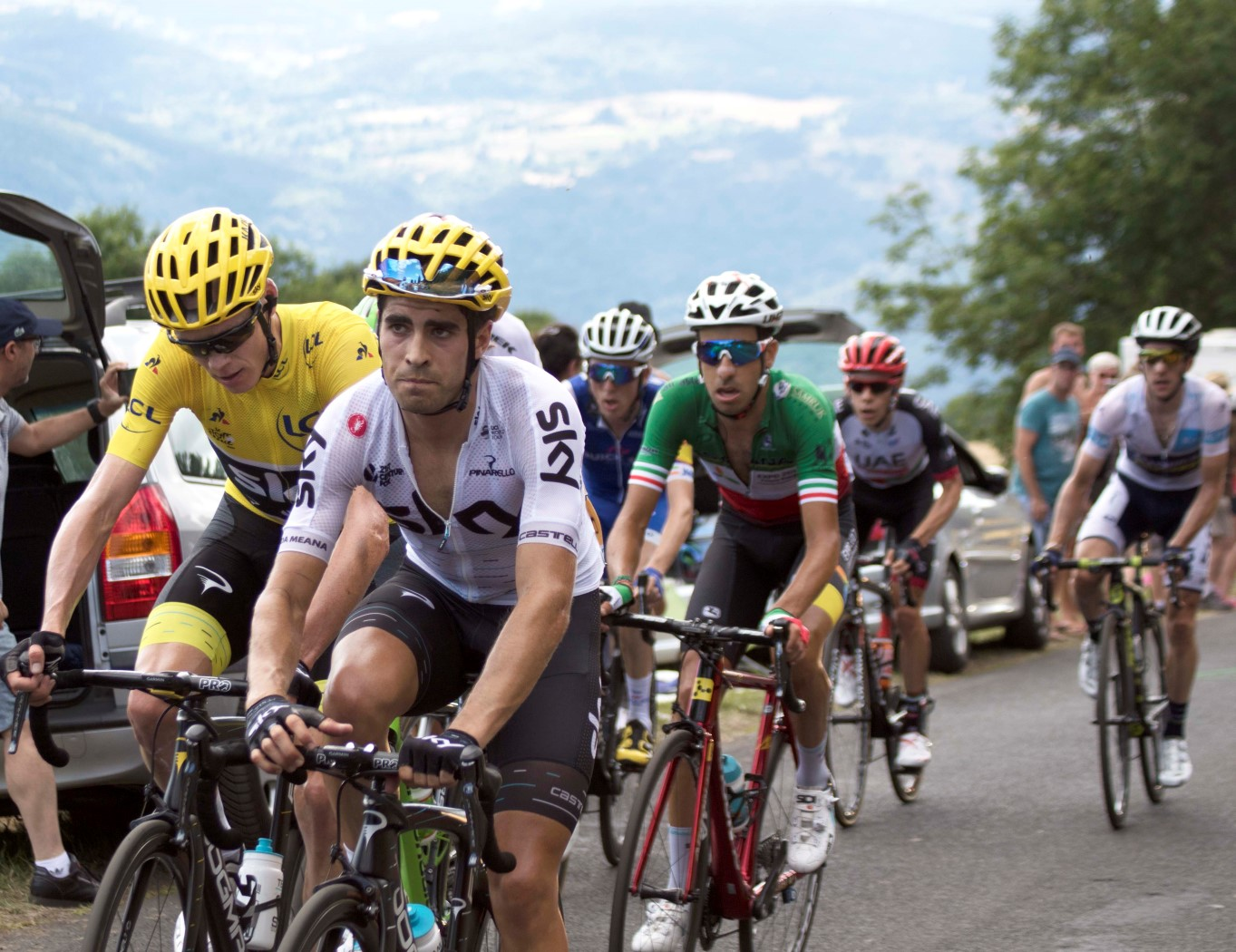 16-7_4 groep gele trui